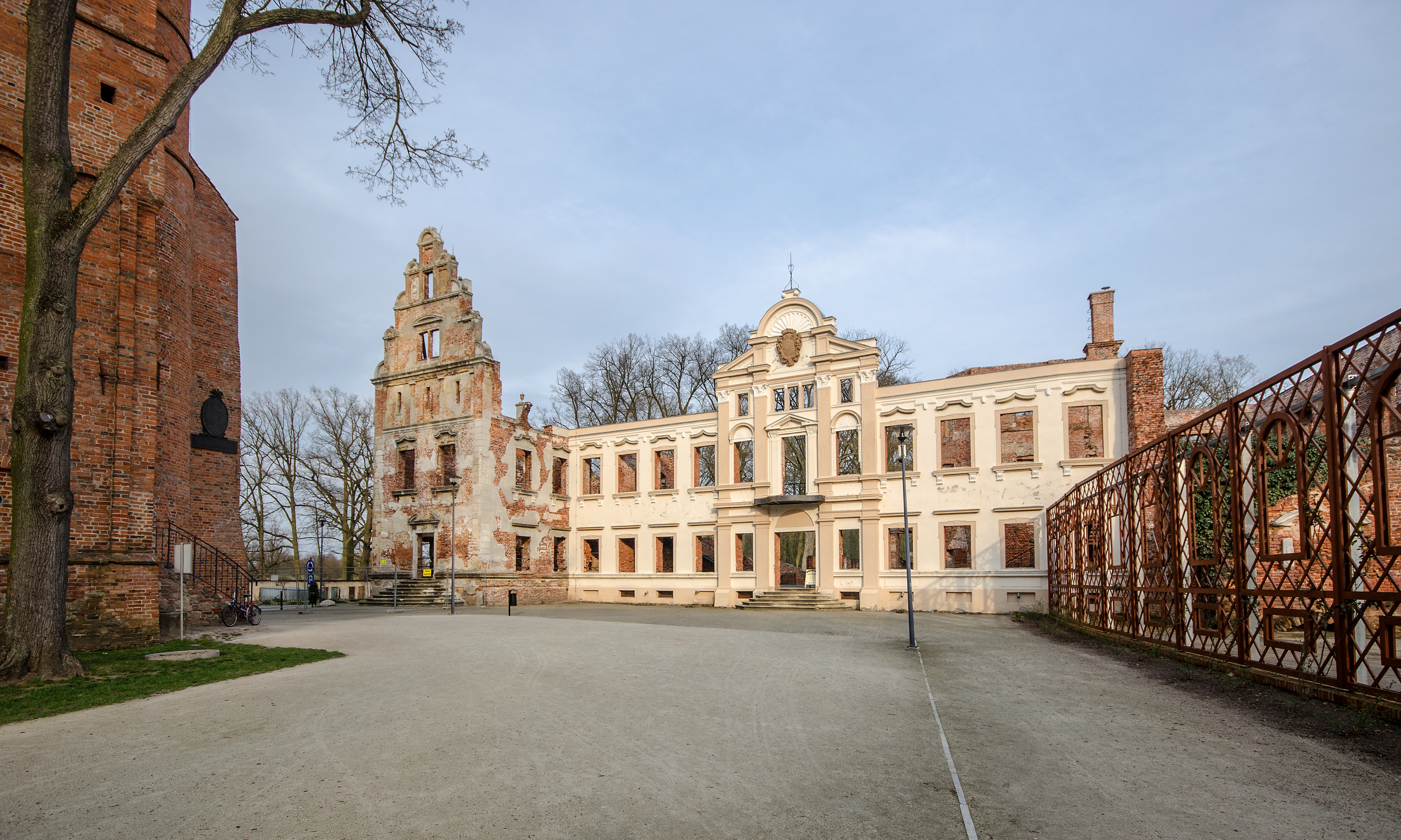 Żmigród, pałac Hatzfeldów (trwała ruina), XVIII, XIX